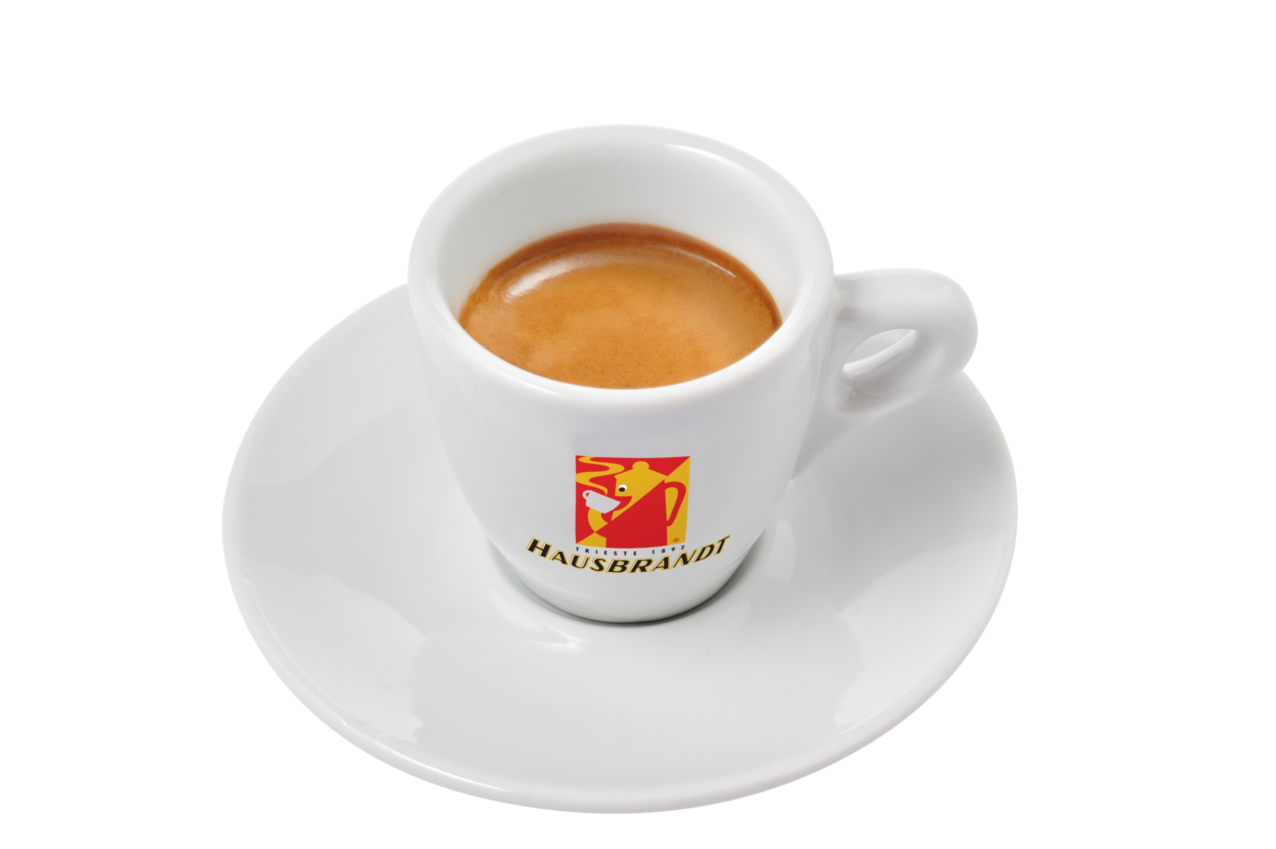 Tazzina di caffè Hausbrandt